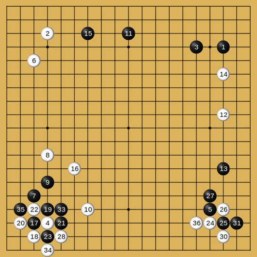 Au jeu de go, Iwamoto Kaoru vs Go Seigen - décembre 1952 - coups 1 à 37